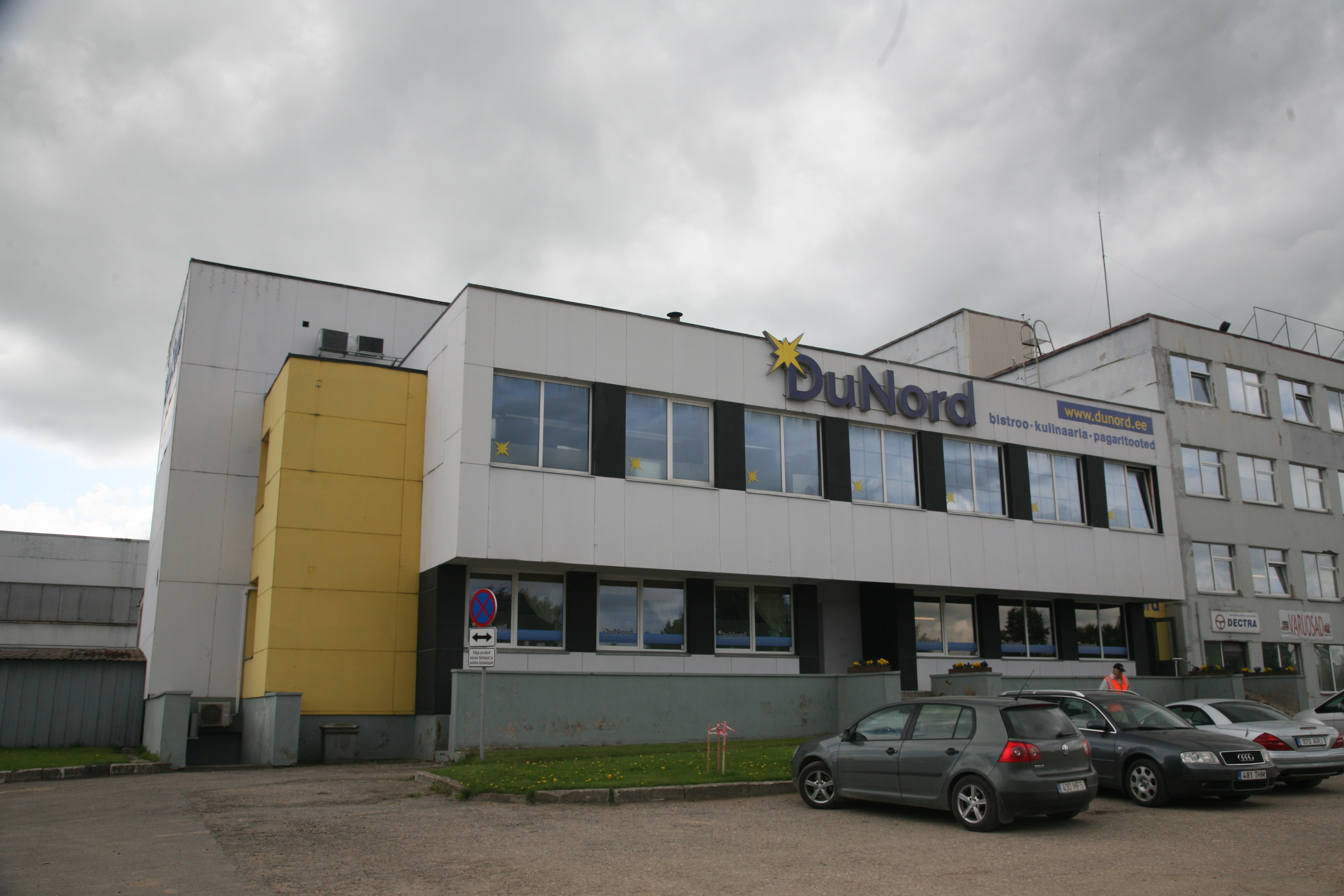 DuNordi hoone Tartus Ringtee tänaval, 28. mai 2013.